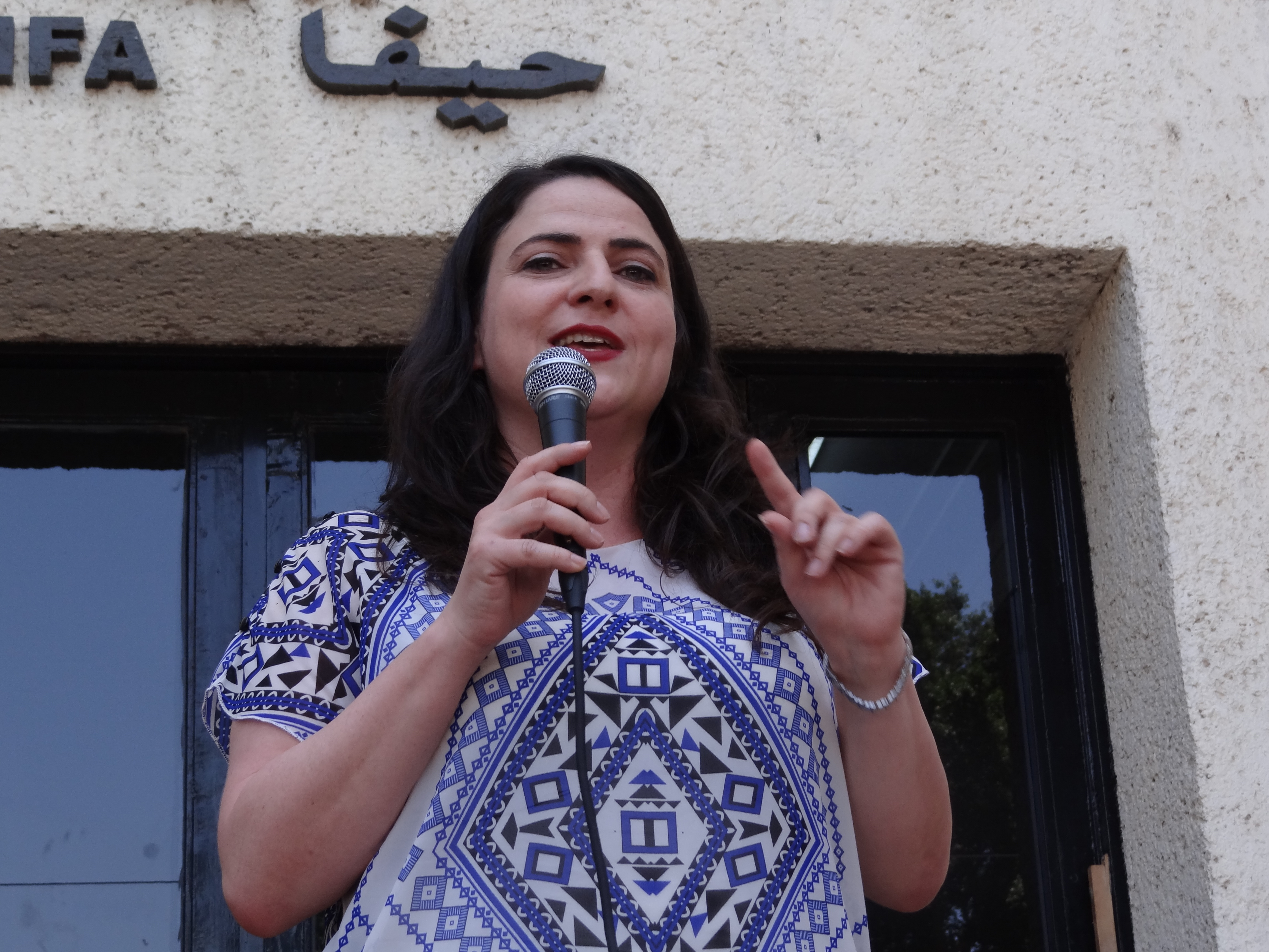 מיכל בירן בעצרת מצעד הגאווה בחיפה 2014